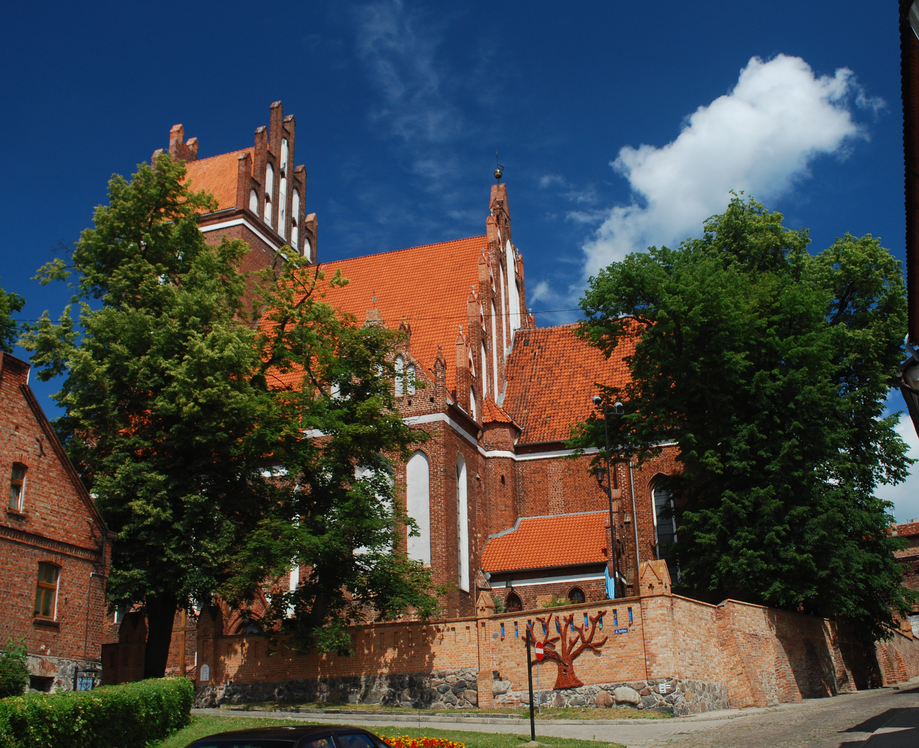 Kościół św. Mikołaja w Gniewie, widok z ul. Sambora.